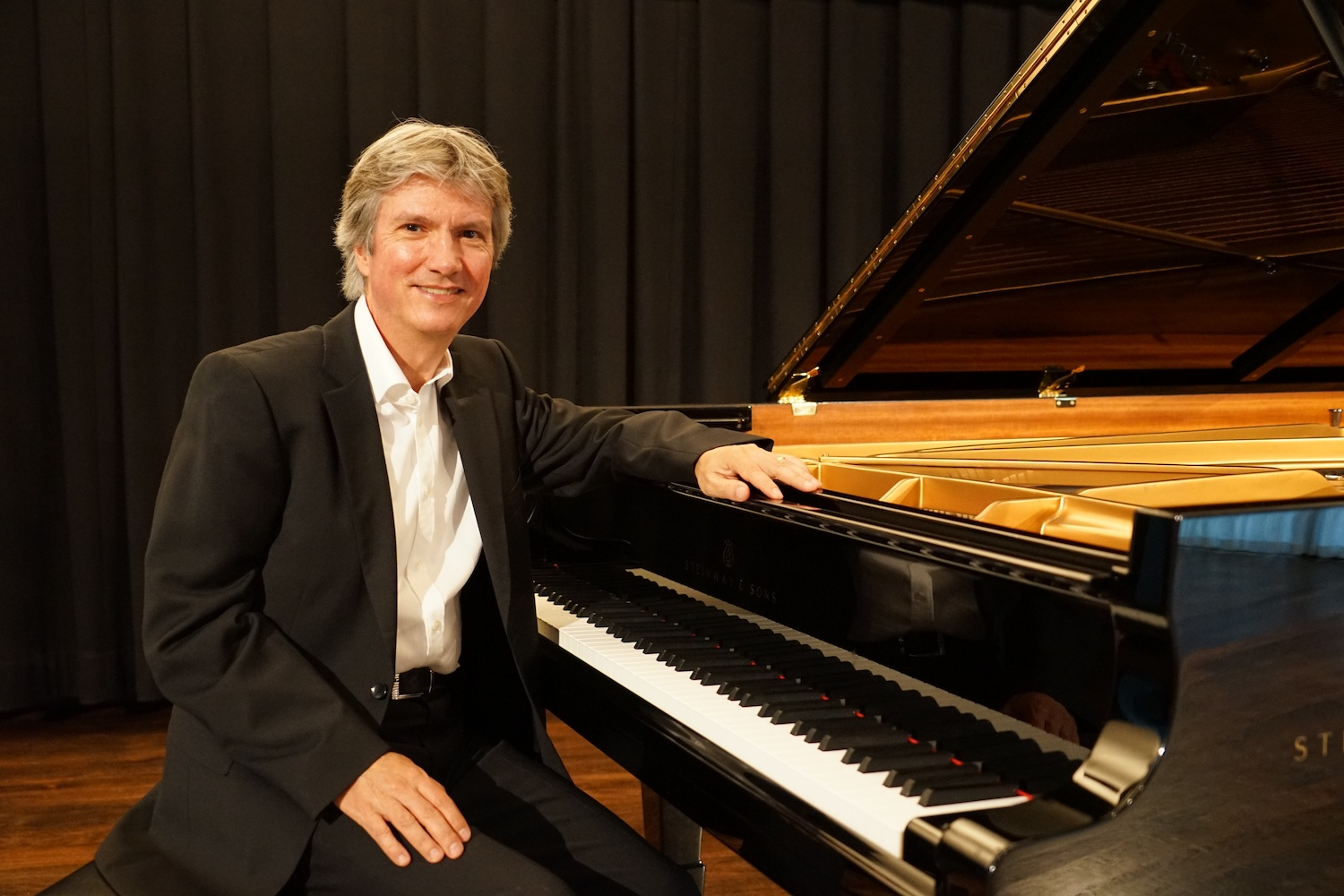 Jürg Hanselmann, 2017